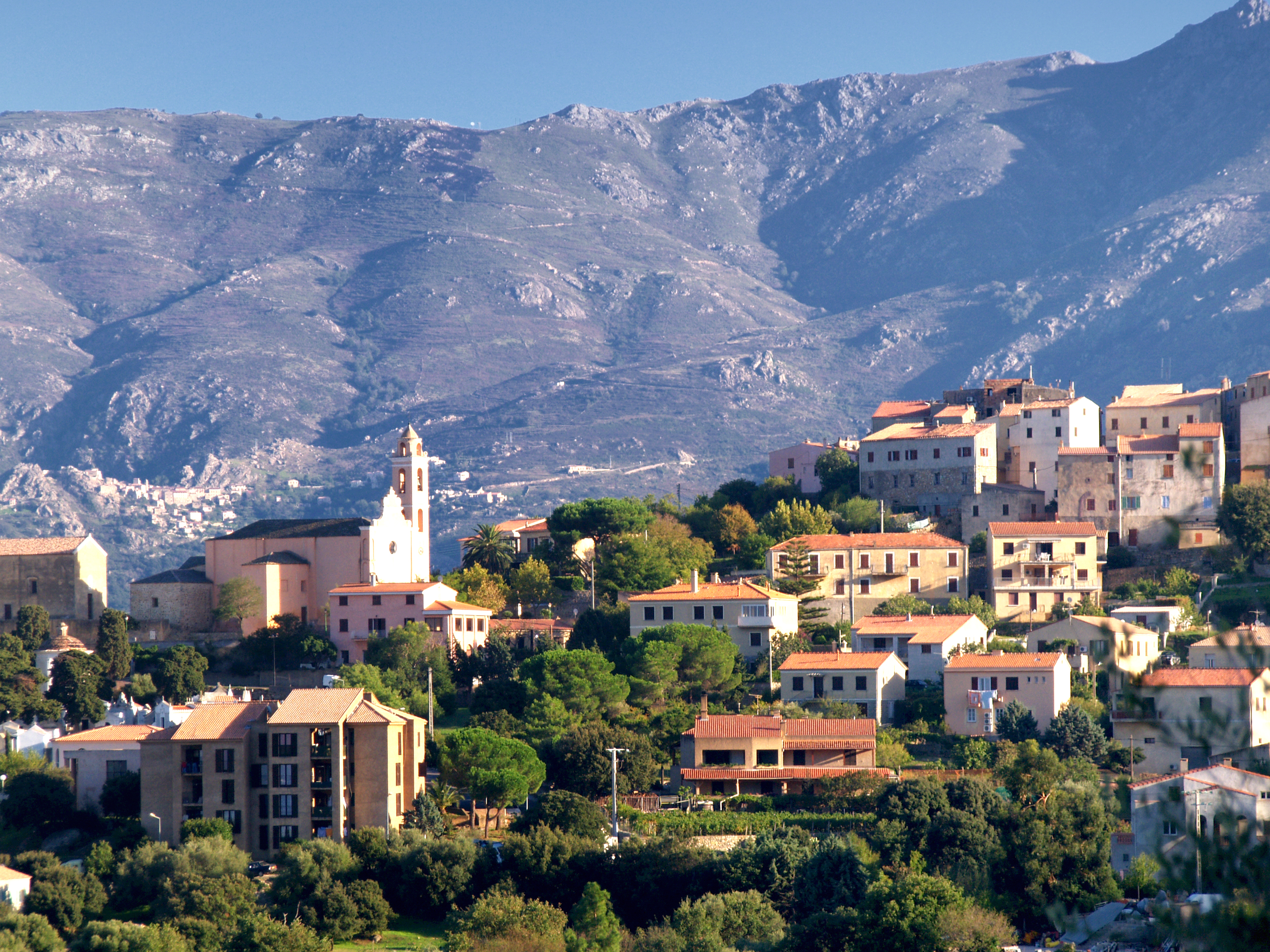 Santa-Reparata-di-Balagna (Corsica) - Vue du village